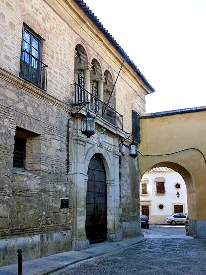 Caballerizas Reales, Córdoba (España)